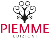 Logo Casa Editrice Piemme Edizioni